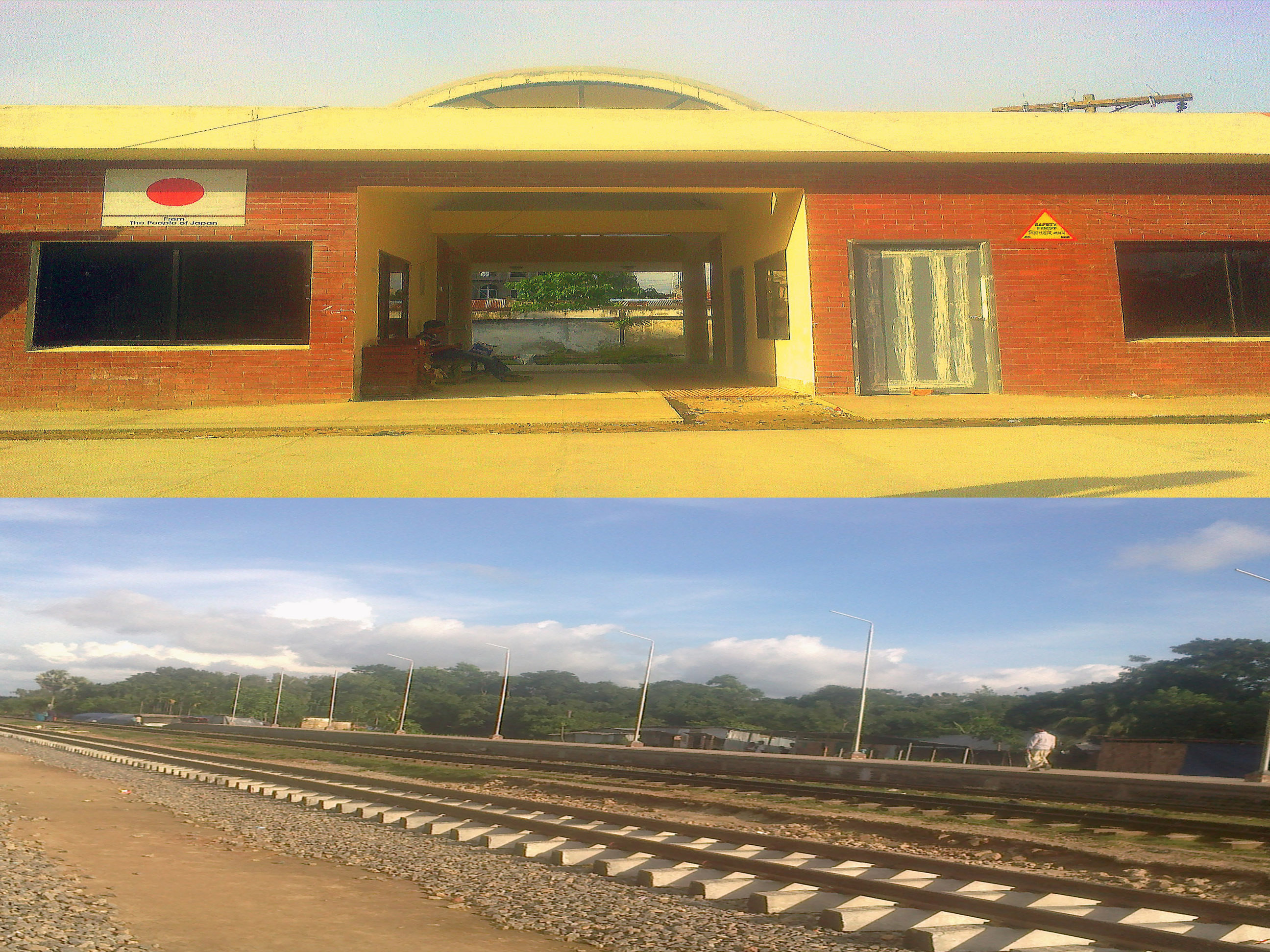 গুণবতী রেল ষ্টেশন